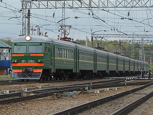 Электропоезд ЭР2-1260, построен в 12-вагонной составности С завода поступил в ТЧ-20 Апрелевка Московской ж.д. В 1990 году передан в ТЧ-17 Нахабино Московской ж.д. С мая 2008 года по май 2010 года носил именное название "Кремлёвские курсанты" C середины октября 2011 года отставлен от эксплуатации В октябре 2012 года отправлен на порезку